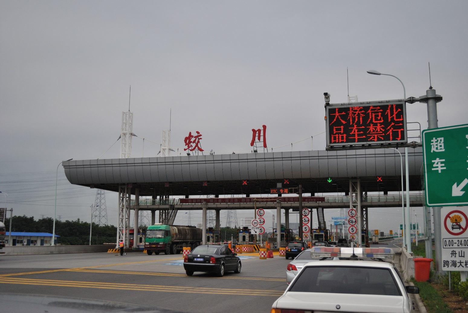 甬舟高速、宁波绕城蛟川收费站